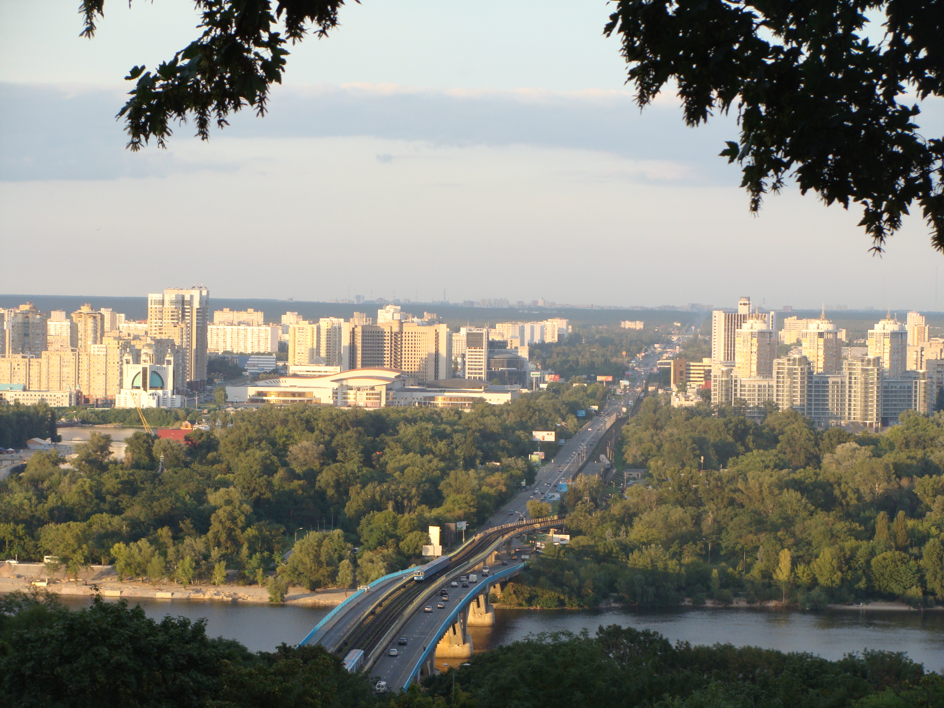 Міст Метро, Київ, Набережна Дніпра